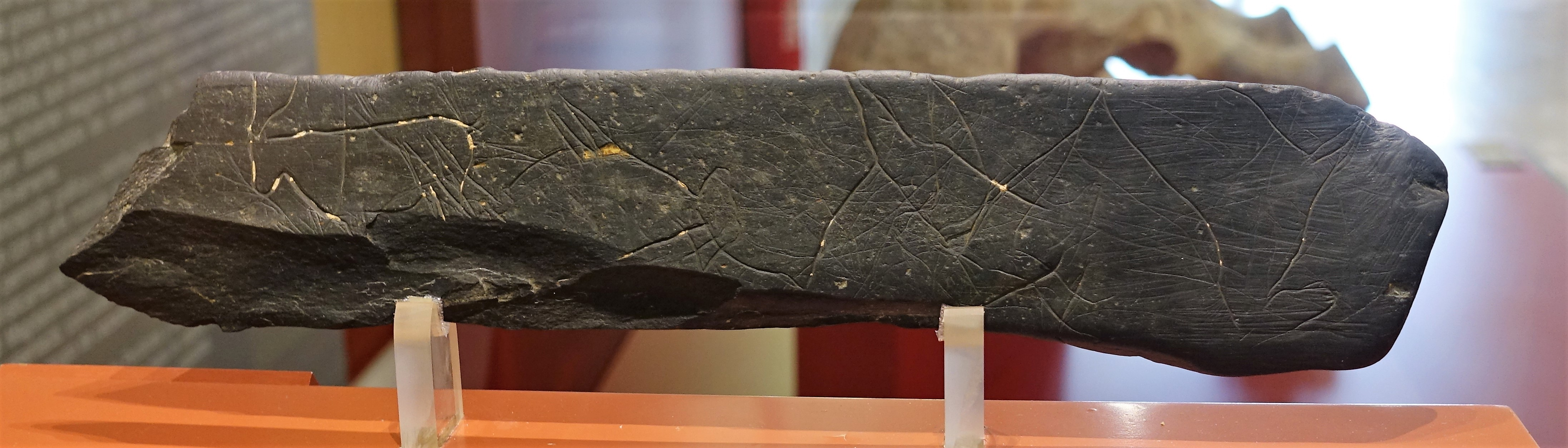 Placa paleolítica de Villalba, una de sus caras, con el borde fracturado a la izquierda. Museo Numantino (Soria)